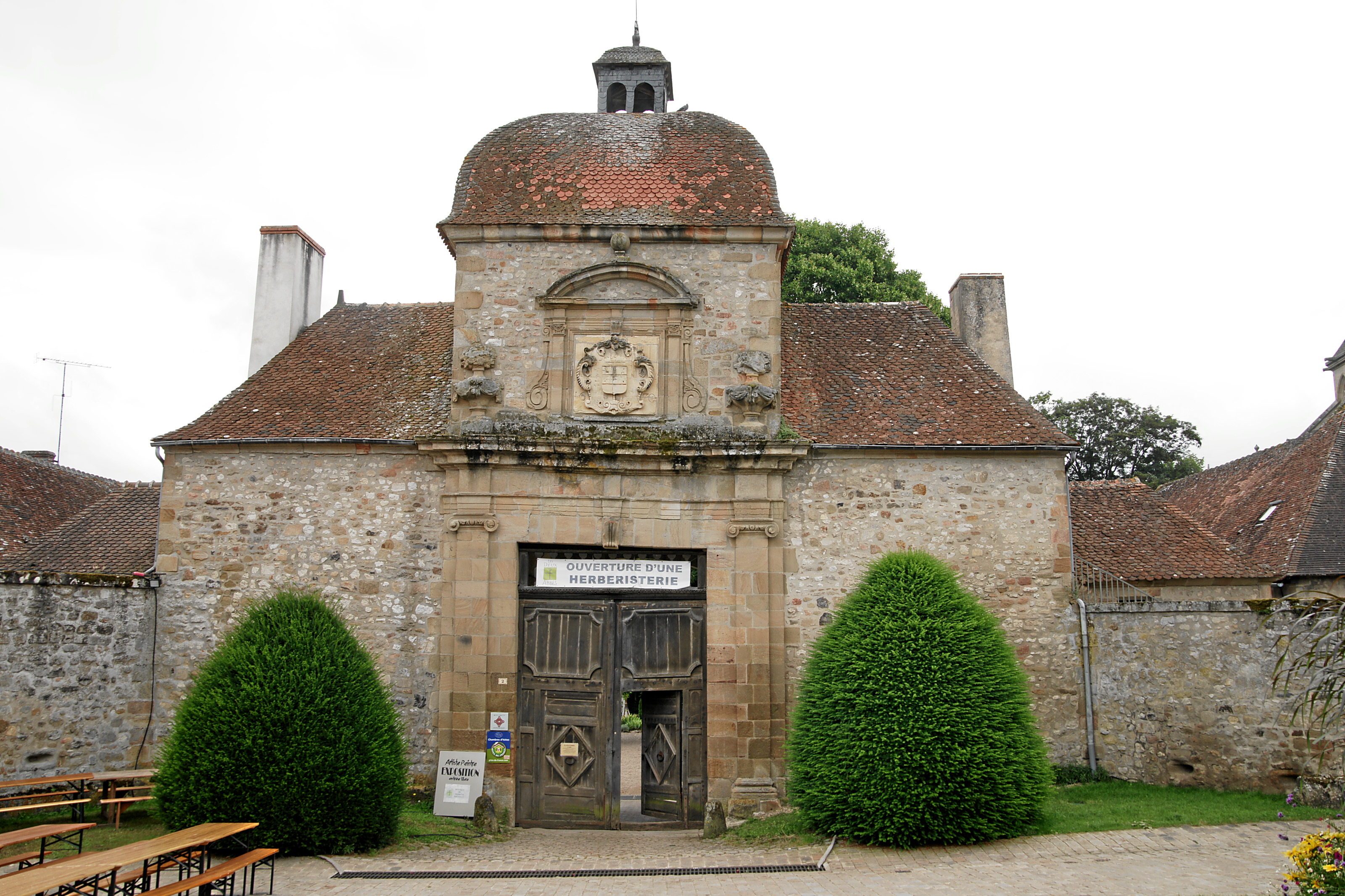 Souvigny: La Porterie